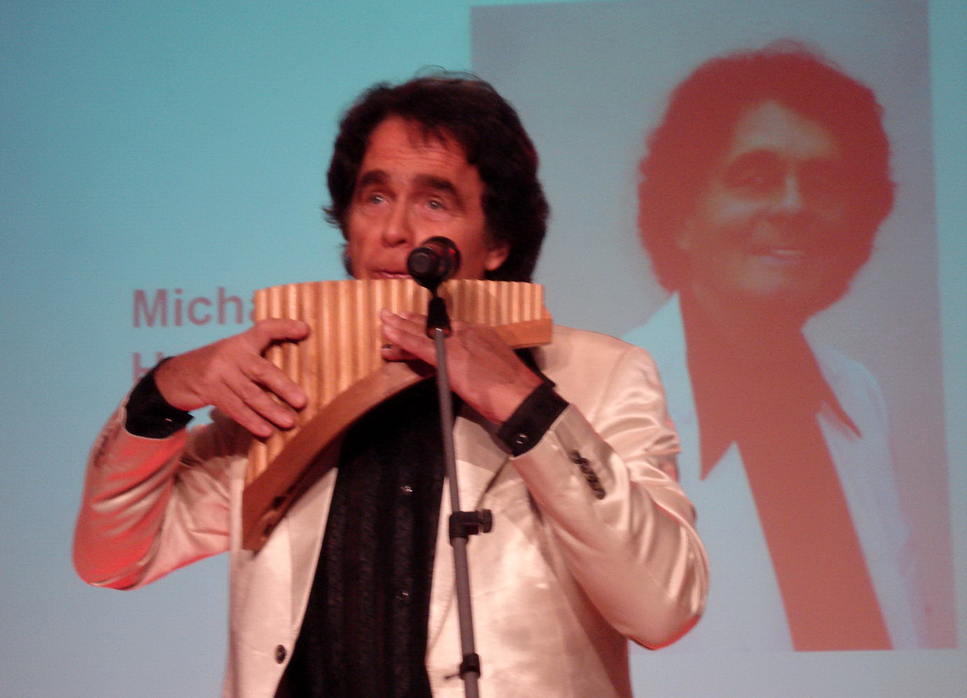 Sänger Michael Hansen mit Panflöte auf der Gala der Grünen Woche 2009.